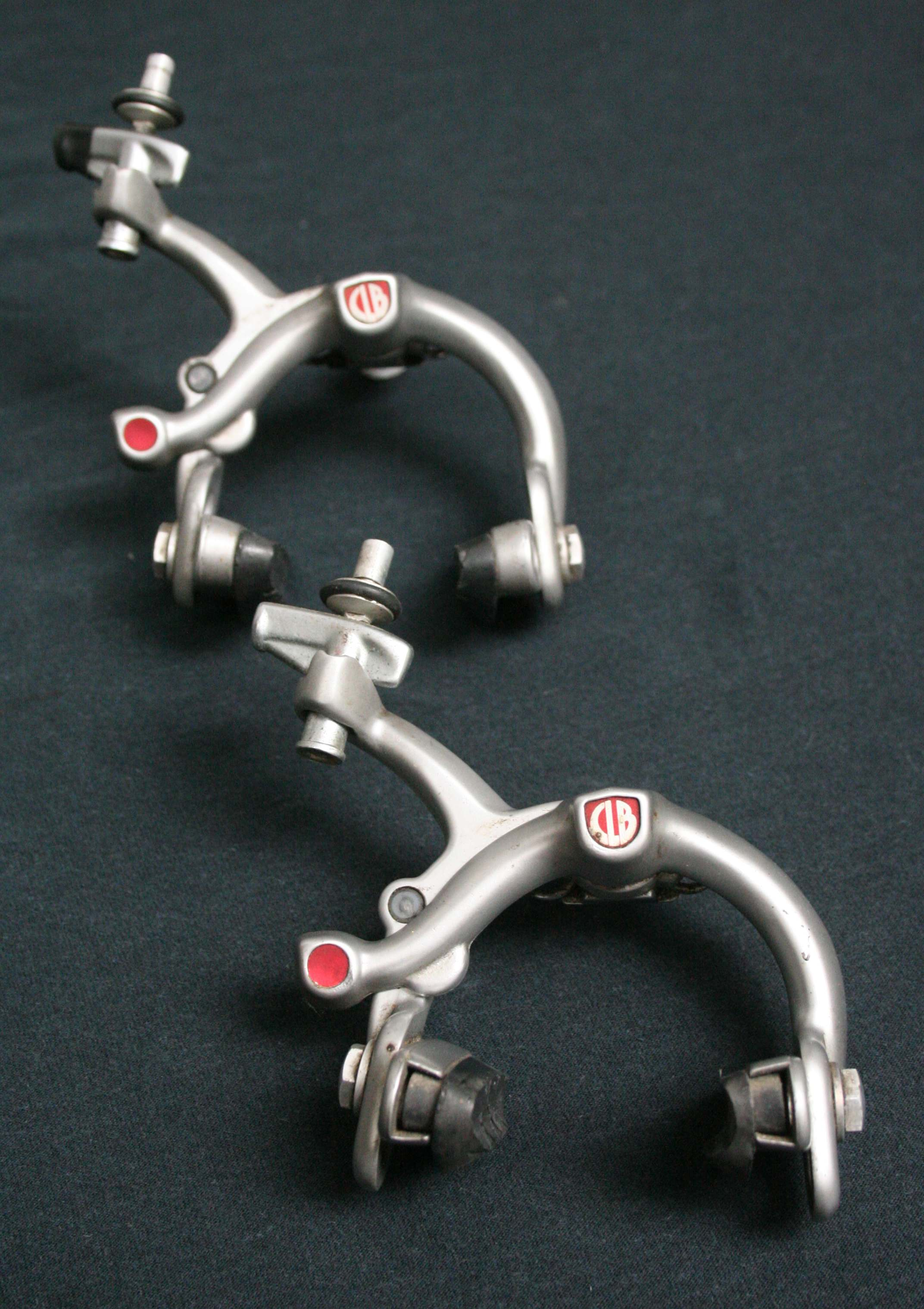 CLB Brakes